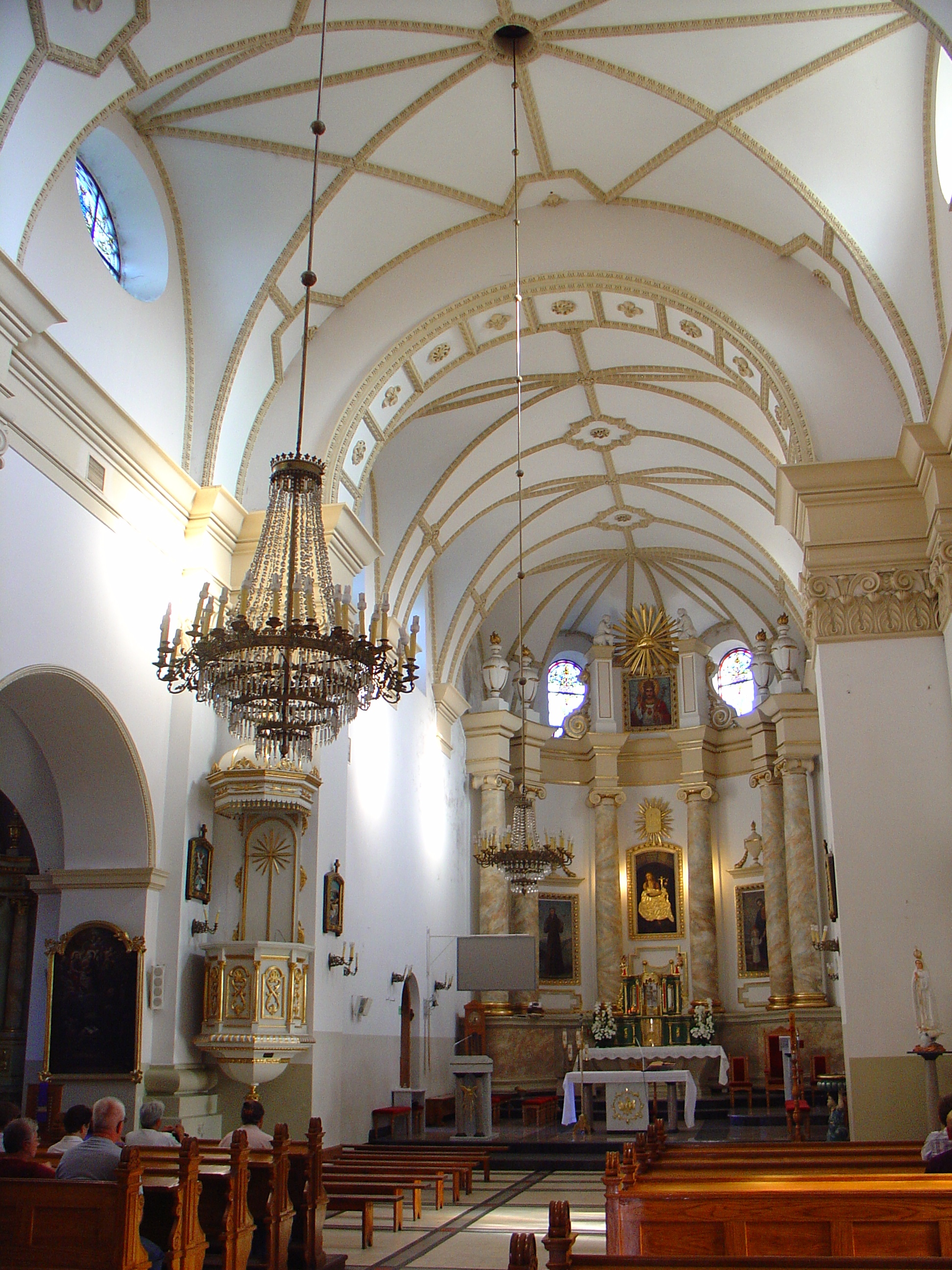 D. zespół klasztorny franciszkanów „w Puszczy”: - kościół, ob. par. p.w. św. Marii Magdaleny (1921-1928) - kaplica p.w. św. Marii Magdaleny (1794) - dzwonnica (XVIII) - klasztor, ob. plebania (4 ćw. XVIII) Puszcza Solska, ul. Krzeszowska 1, miasto Biłgoraj